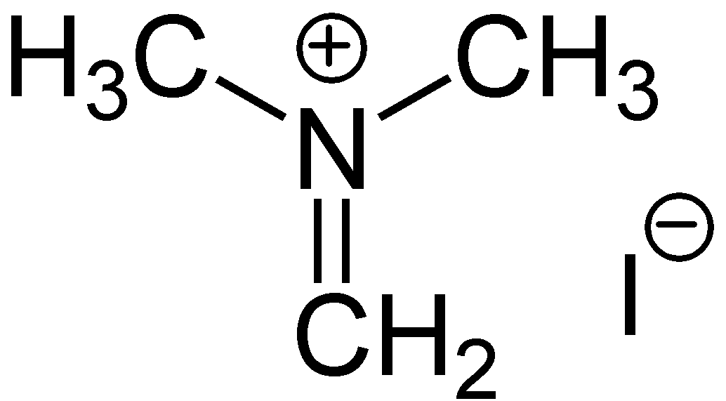 Struktur von Eschenmosersalz